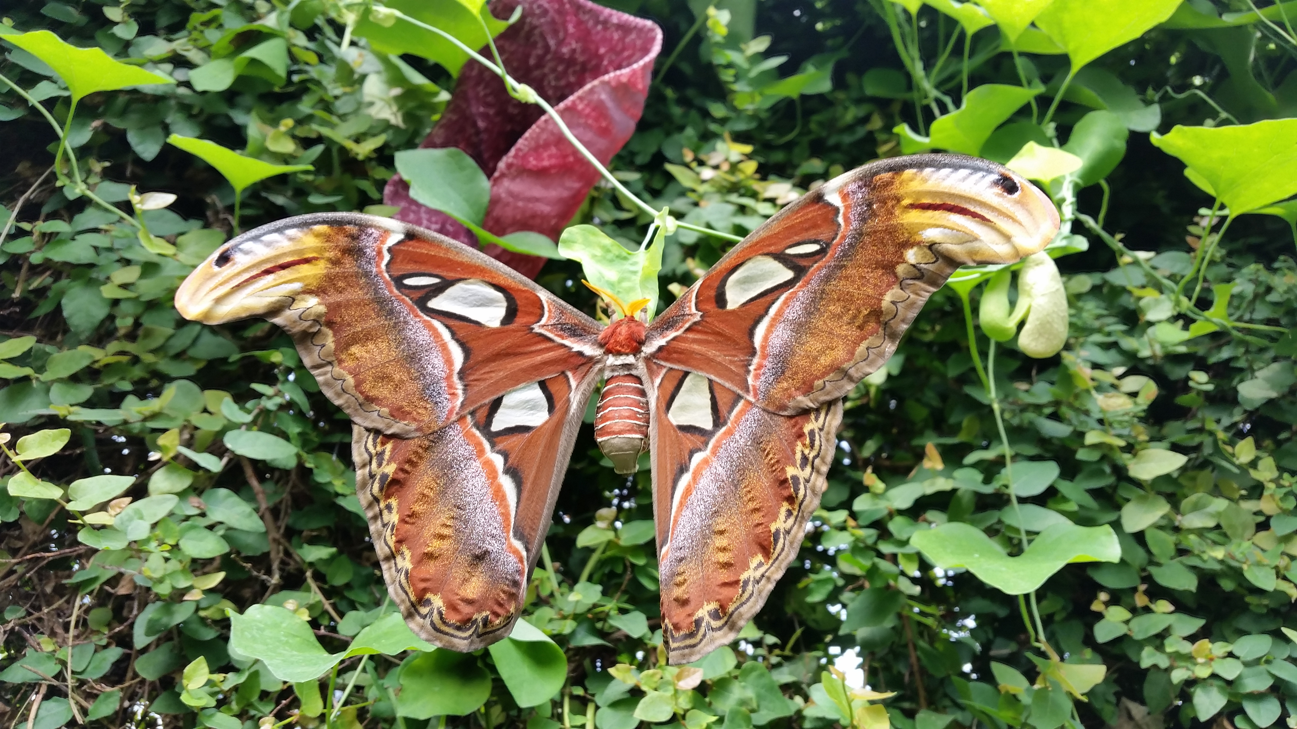 Falena Cobra-Attacus atlas